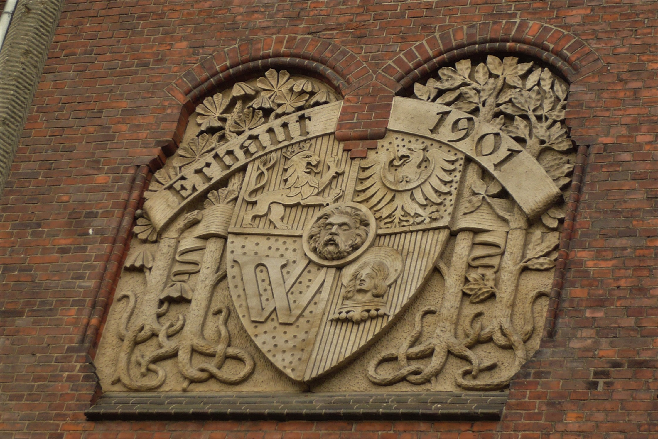 Herb Wrocławia